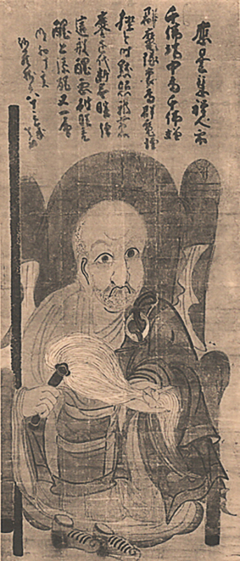 Motiv Hakuin Ekaku gemeinfrei